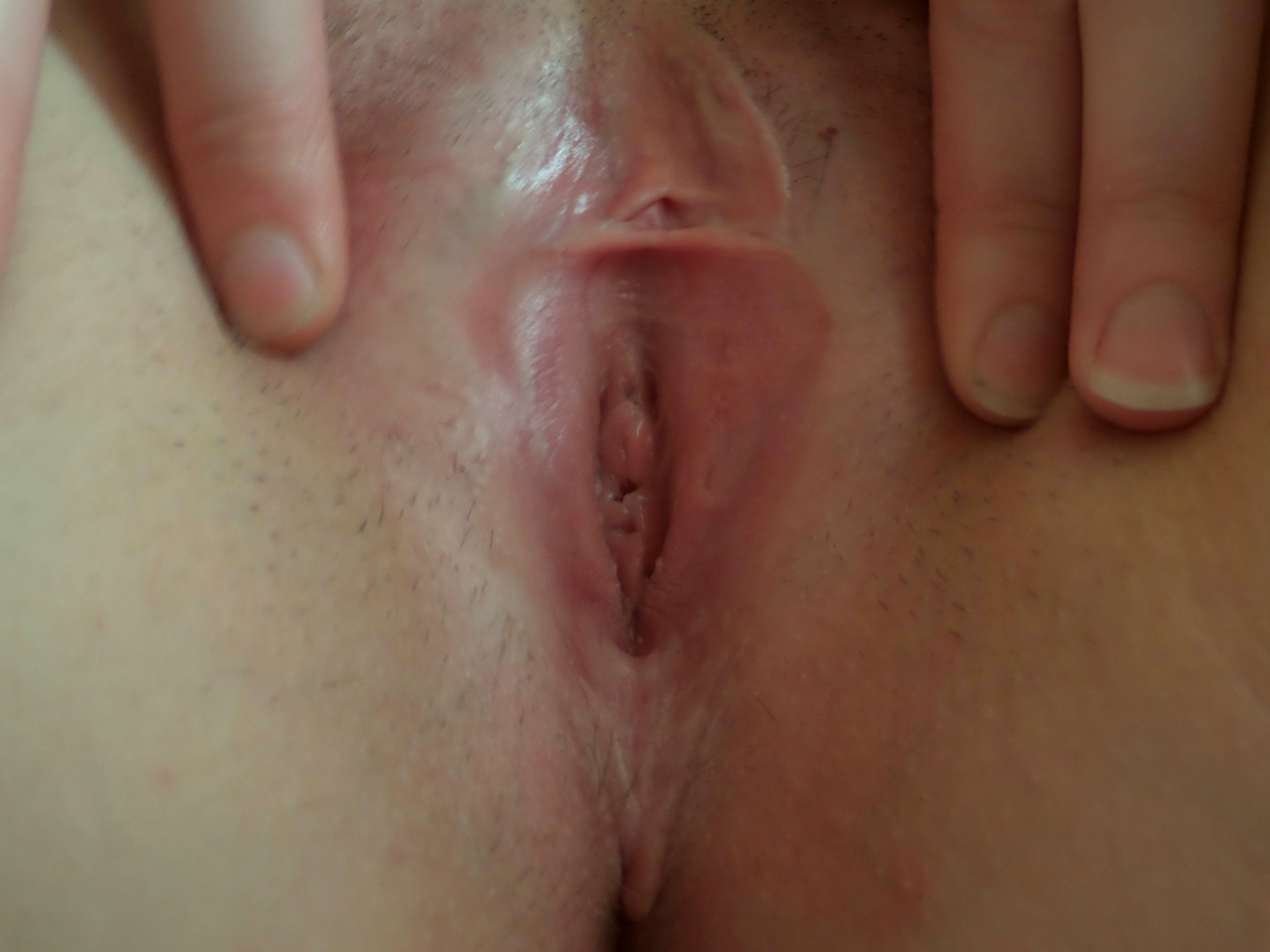 Nach der Entfernung der inneren Schamlippen